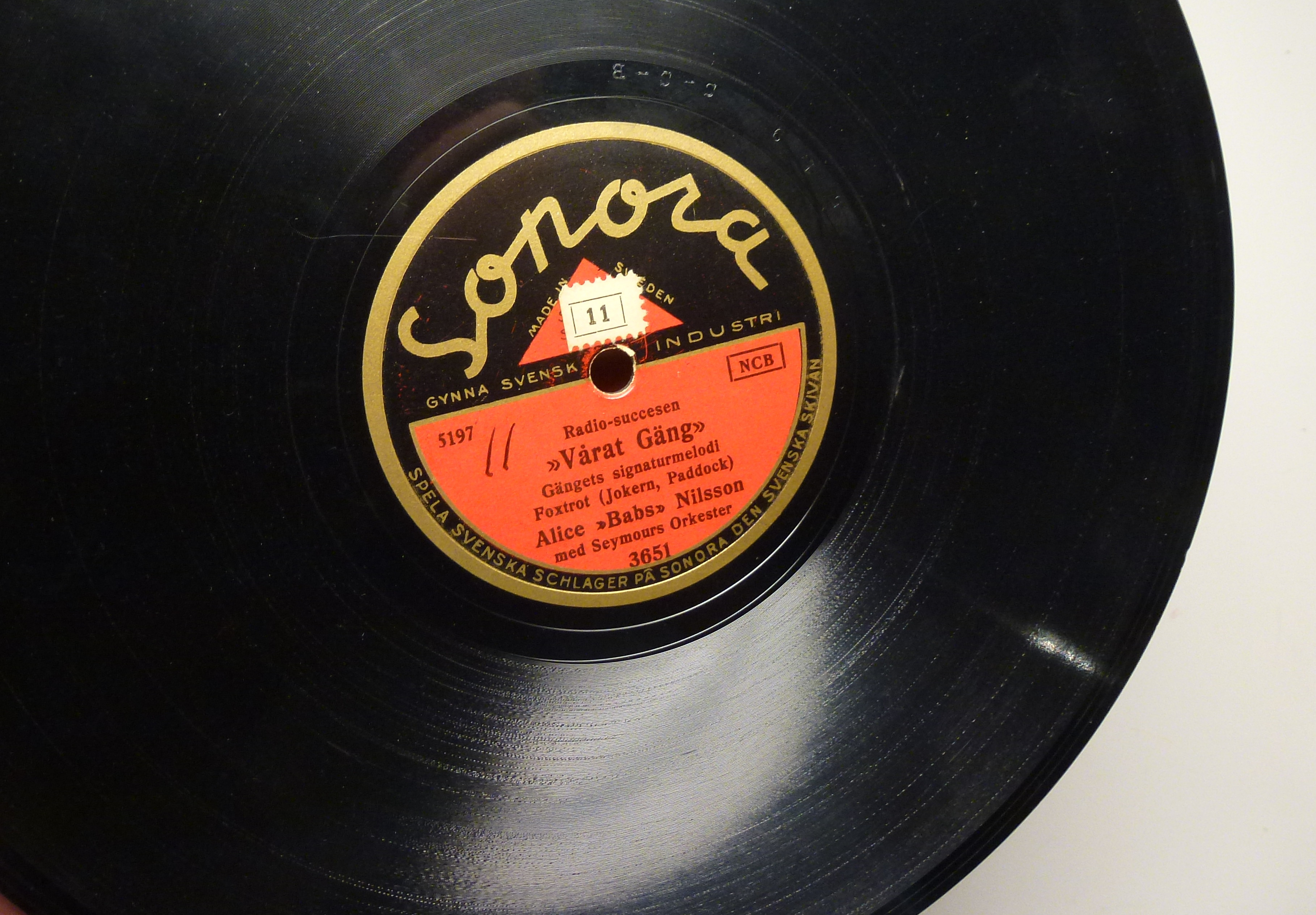 Alice Babs "Vårat Gäng", Sonora 1942